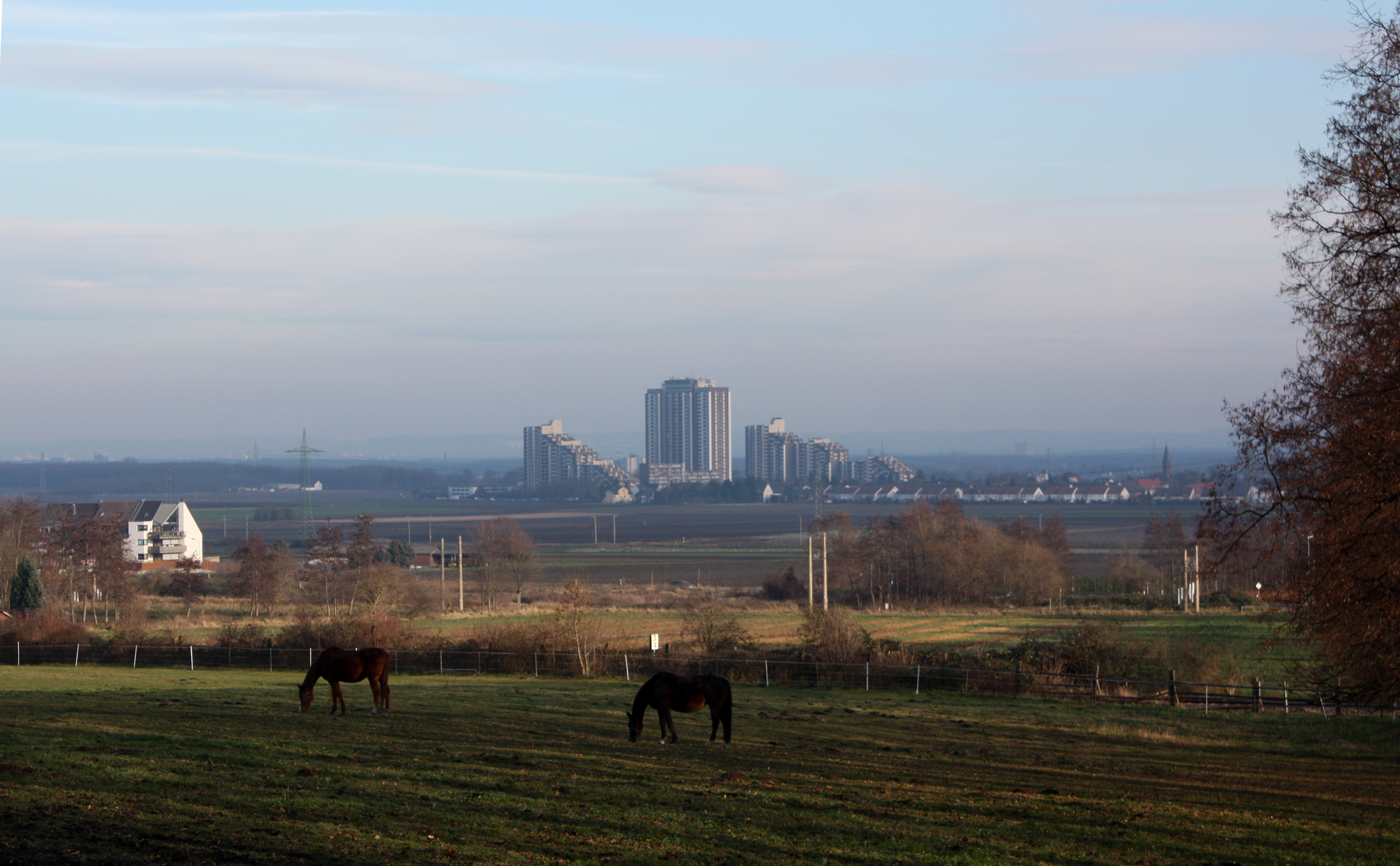 Hürth-Fischenich, Weilerhof. Blick nach Köln-Meschenich